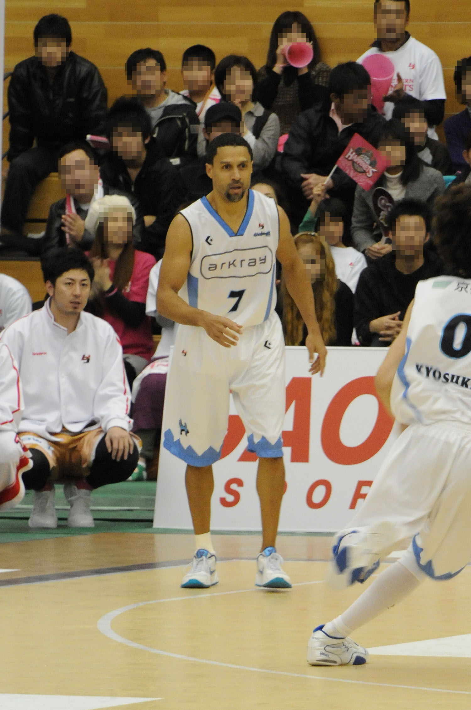 京都ハンナリーズのマクムード・アブドゥル＝ラウーフ選手。能代市総合体育館で。